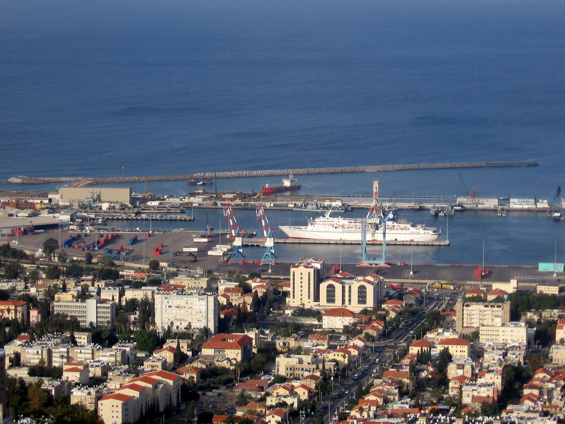 שובר גלים חדש בנמל חיפה